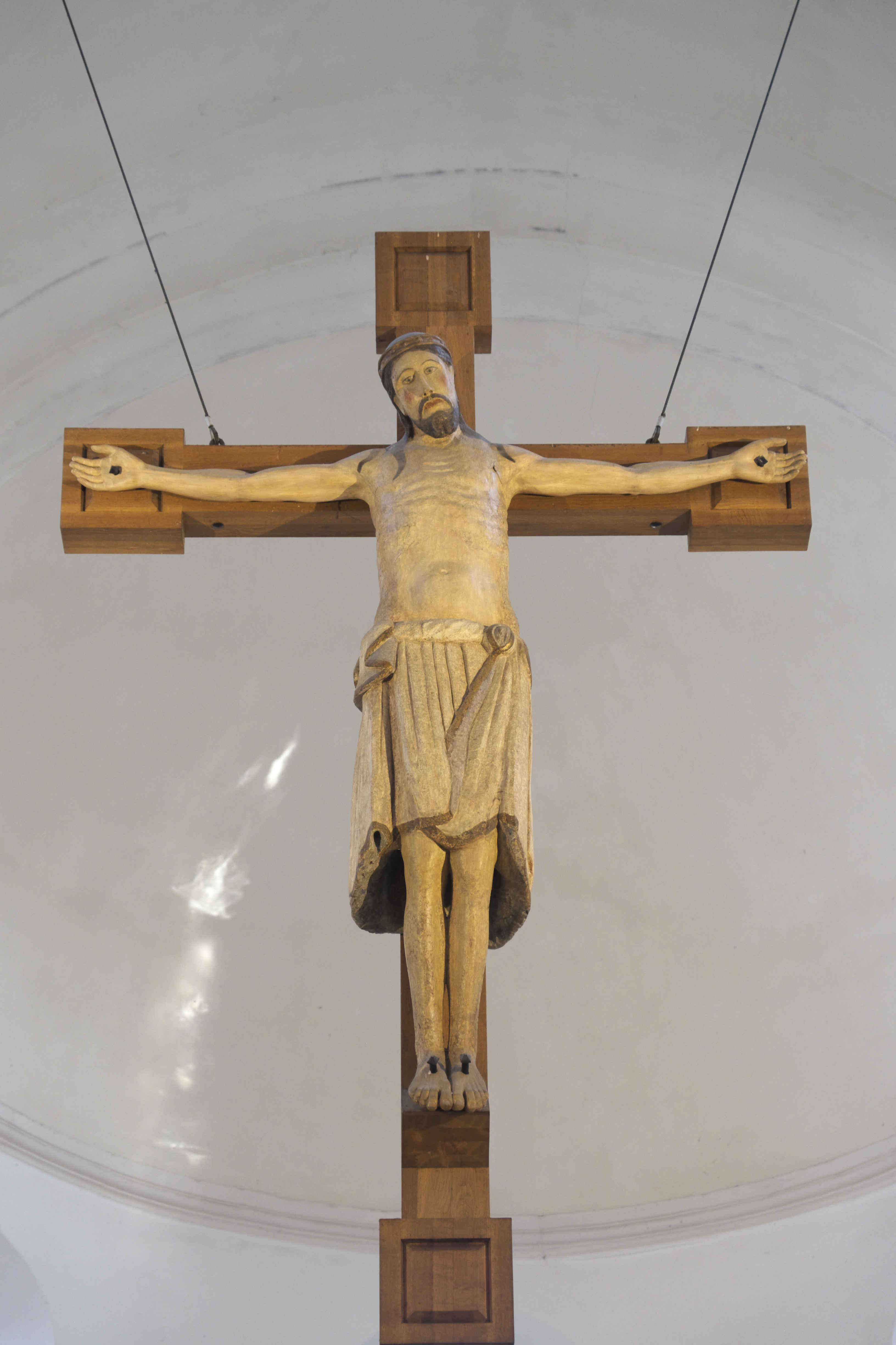 Alte katholische Pfarrkirche St. Peter in Straubing (Bayern/Deutschland), romanisches Triumphkreuz aus dem 12. Jahrhundert